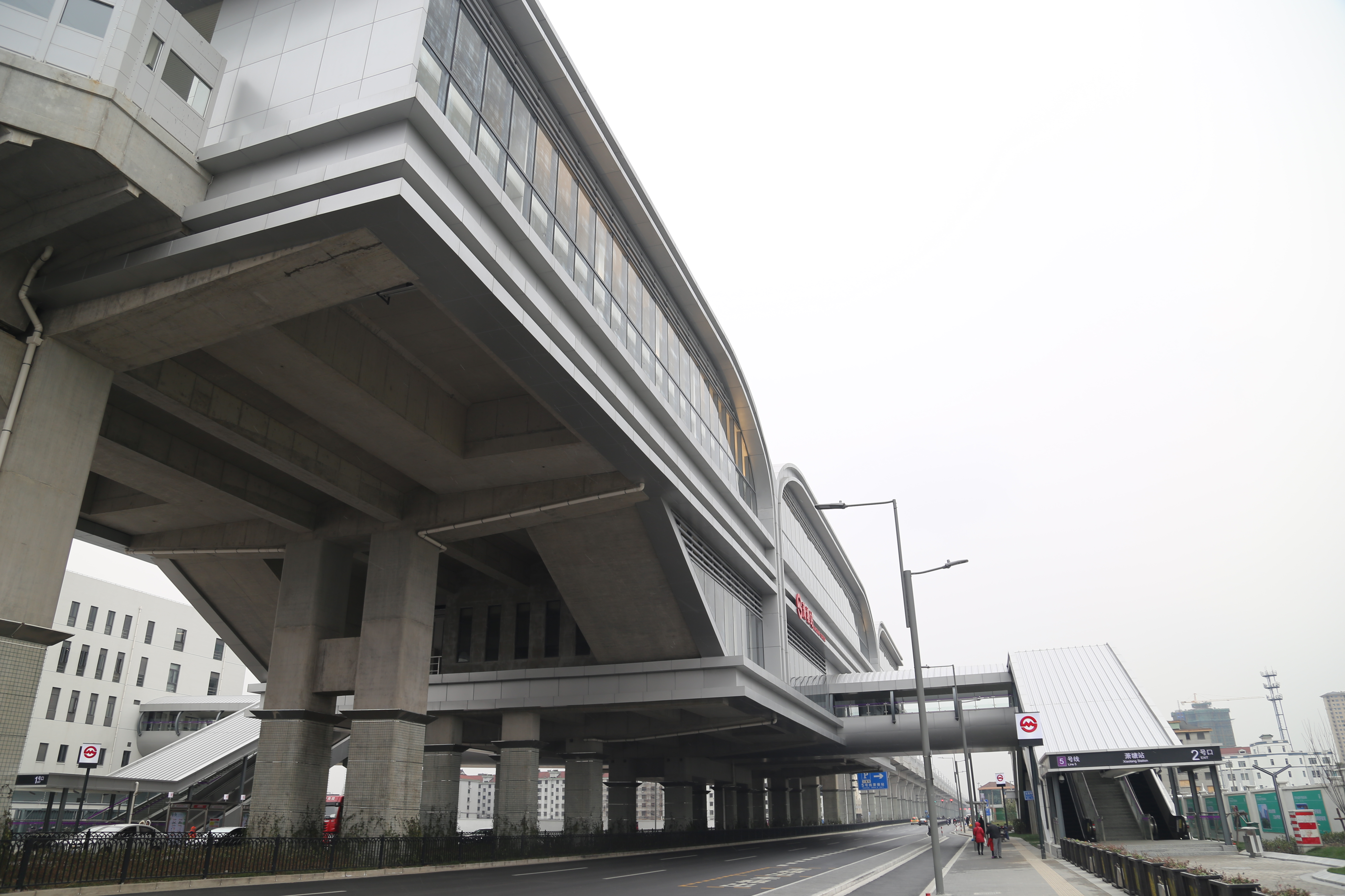 萧塘站站房